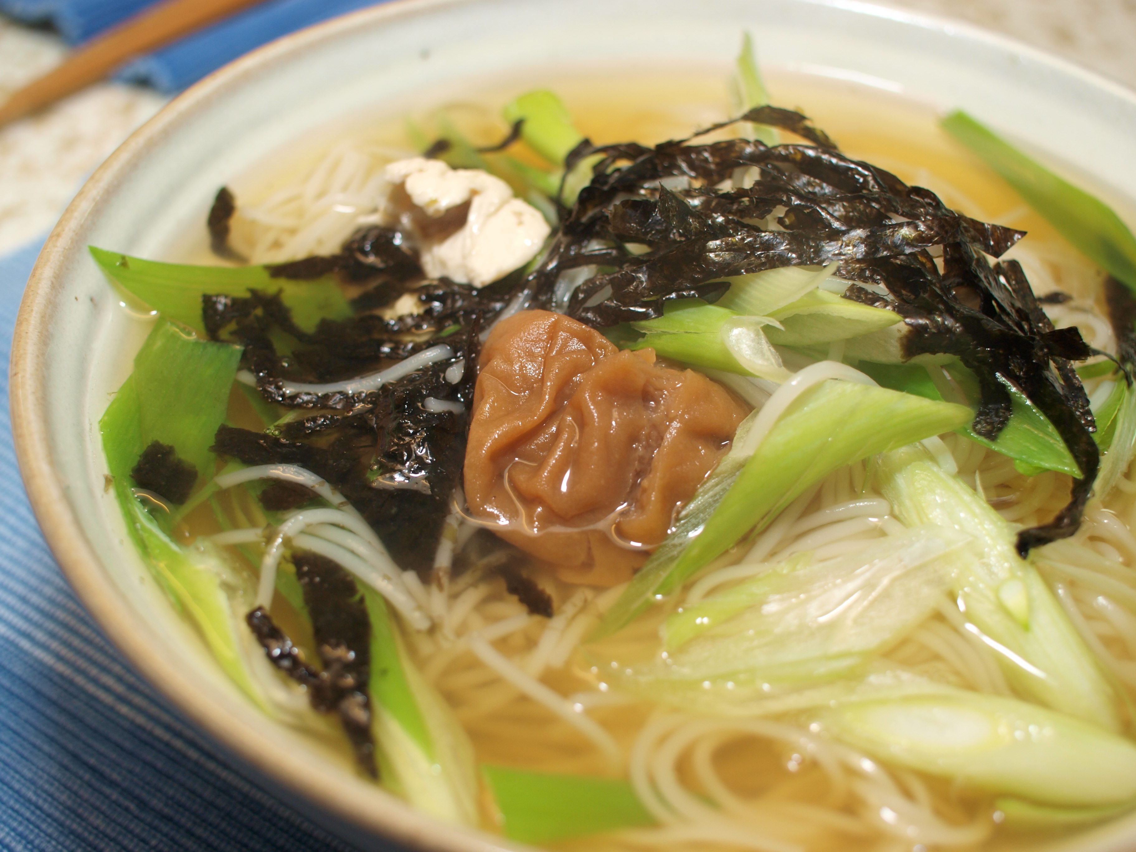 うめにゅうめん・梅干入り温素麺